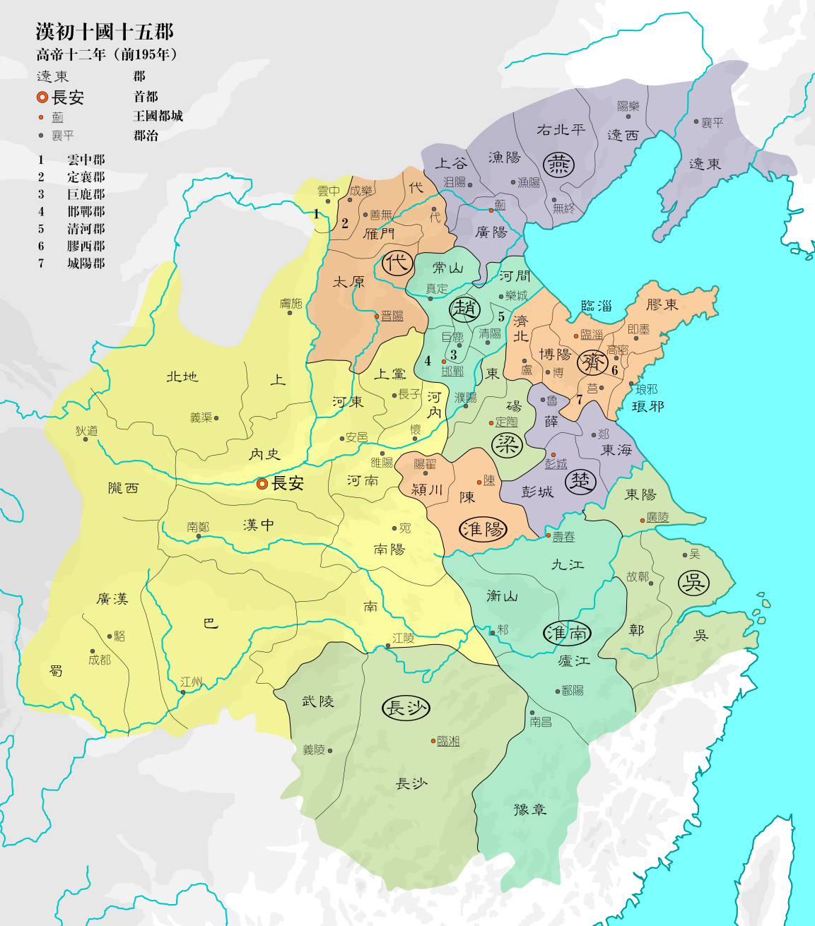 中文（中国大陆）: 汉高帝十二年（前195年）的诸侯国和汉郡。此时汉朝共分封十个王国，其中同姓九个，异姓一个（长沙国），天子直辖区包括京师内史共十五郡。参见周振鹤《西汉政区地理》。